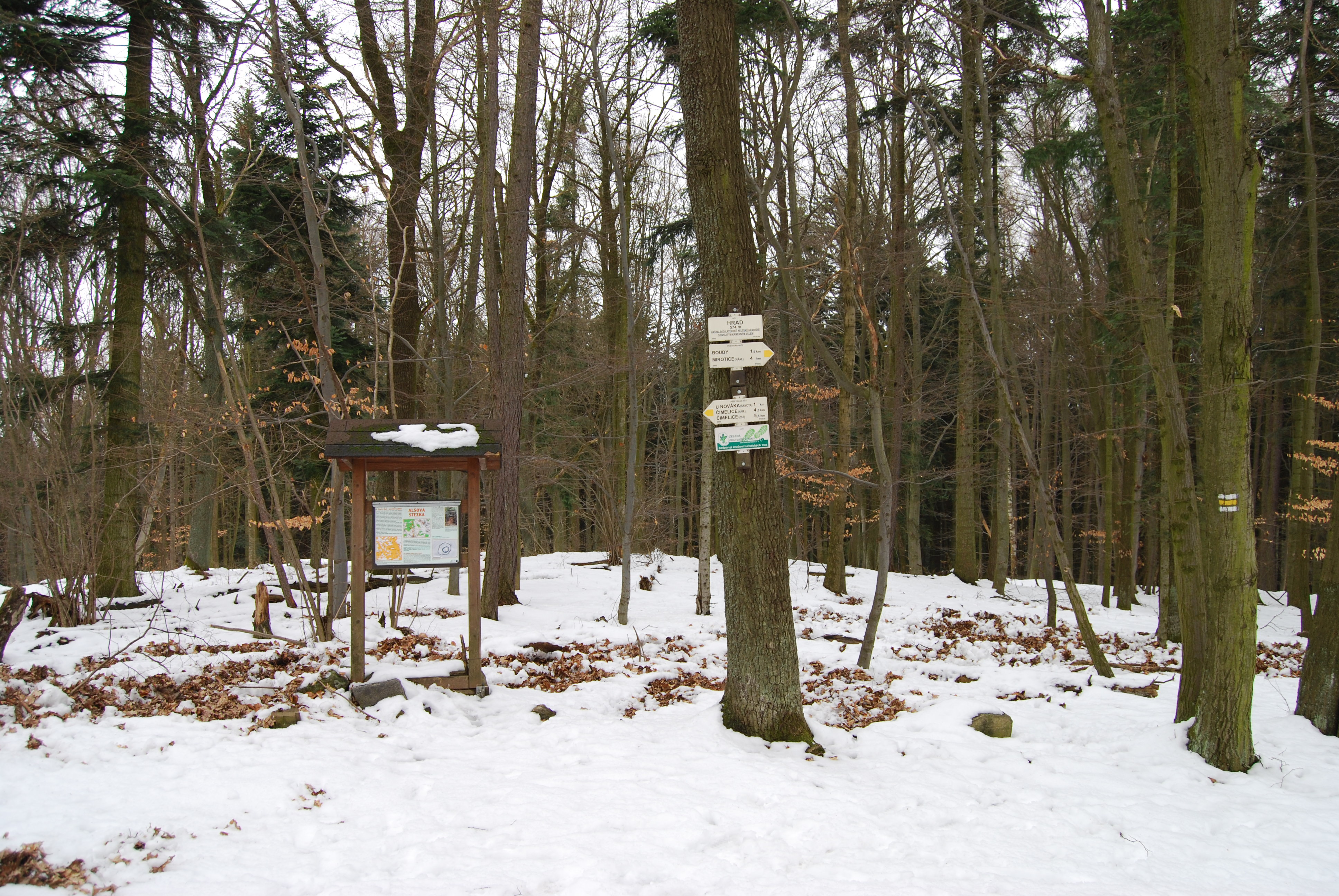 Info tabule. Při kótě 574 se nachází výšinné opevněné sídliště - hradiště halštatsko - laténské. Boudy. Okres Písek. Česká republika.